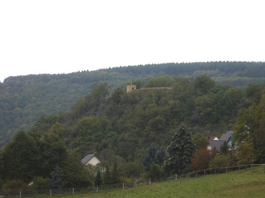 Bildbeschreibung: Naumburg im Nahetal Quelle: selbst fotografiert Fotograf: Matw